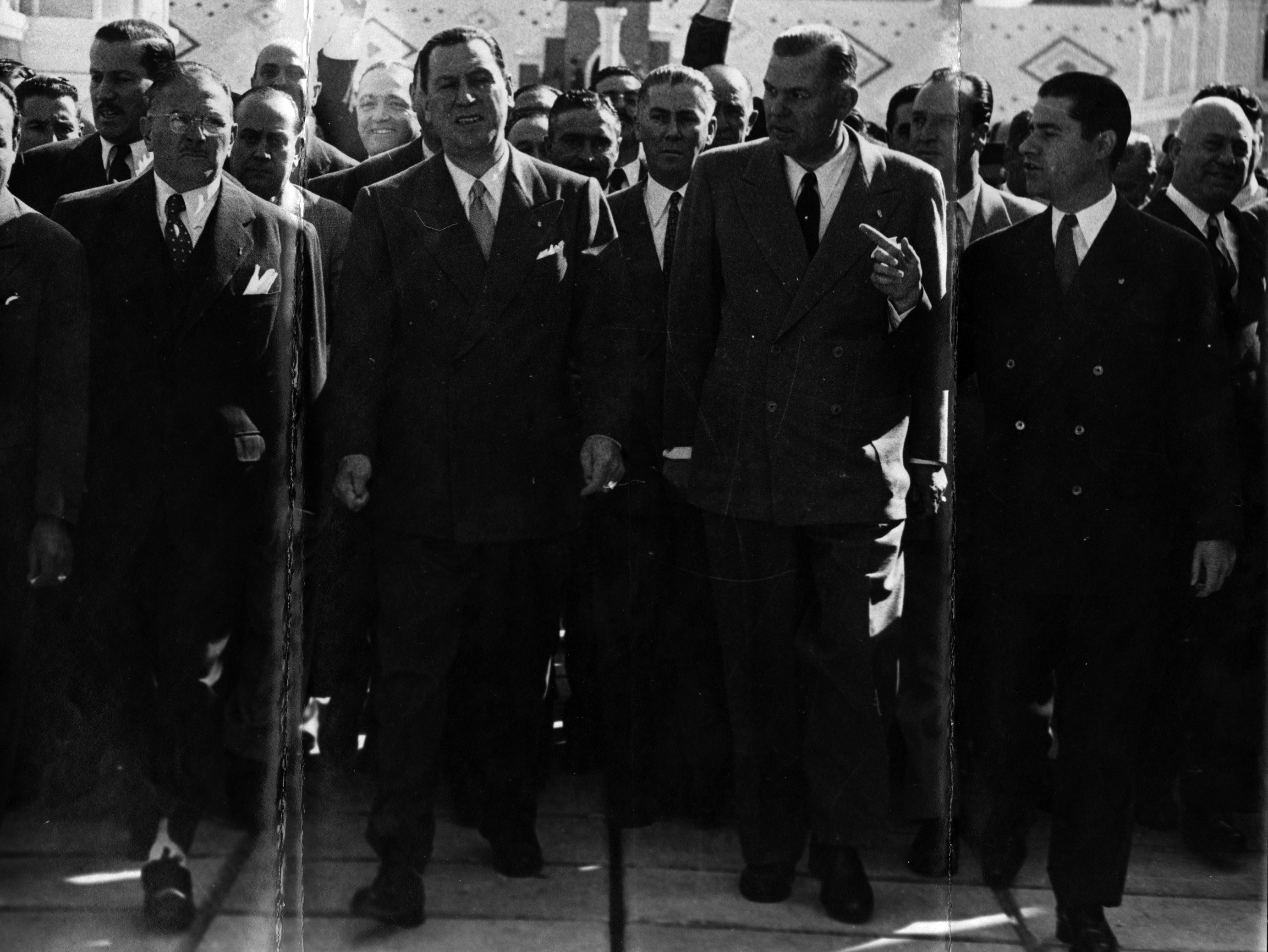 Imagen- Domingo Alfredo Mercante, Juan Domingo Perón, Carlos Vicente Alóe This file was provided to Wikimedia Commons thanks to an agreement between the Archivo Histórico de la Provincia de Buenos Aires and Wikimedia Argentina.